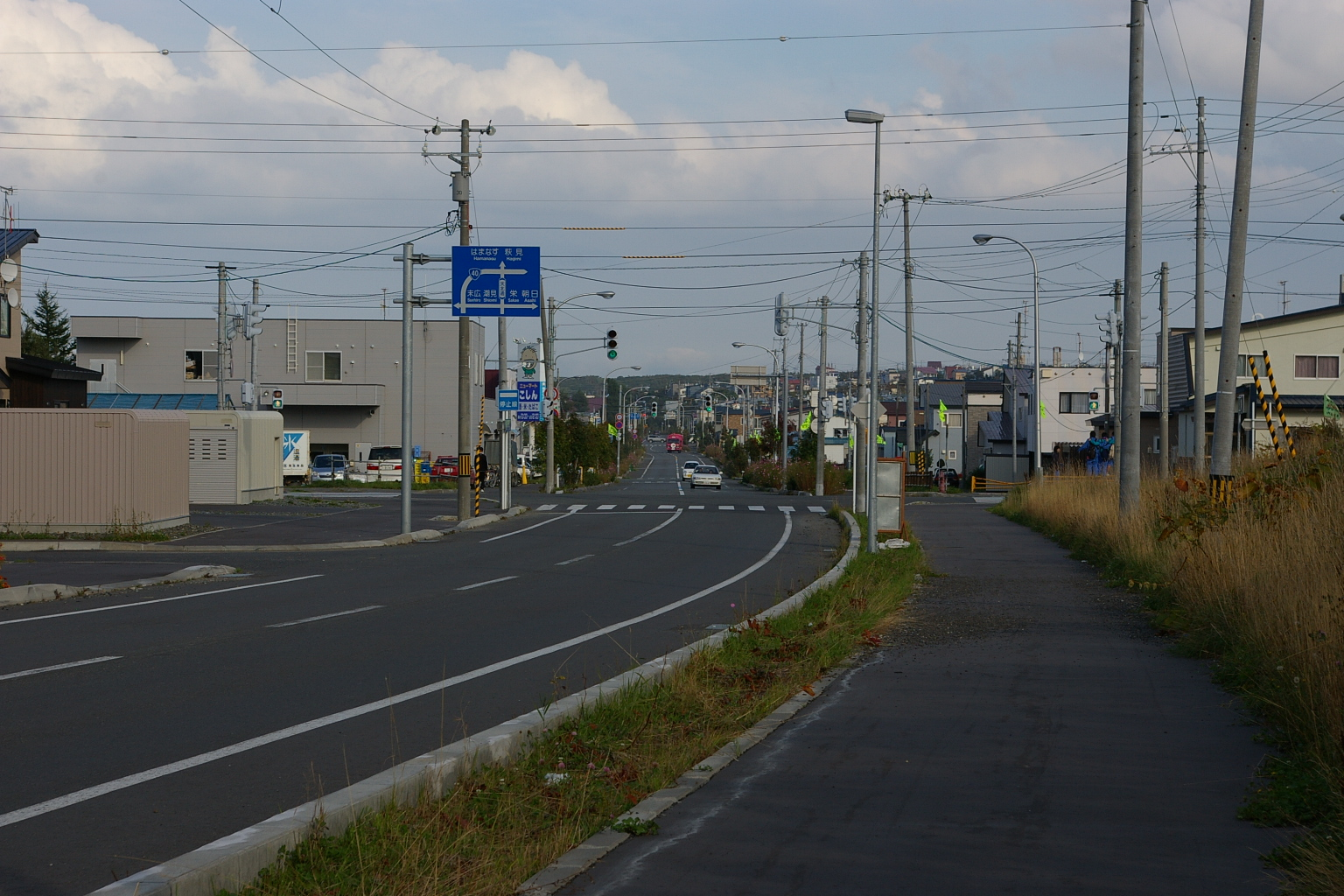 JNR Tenpoku line site (Wakkanai city).